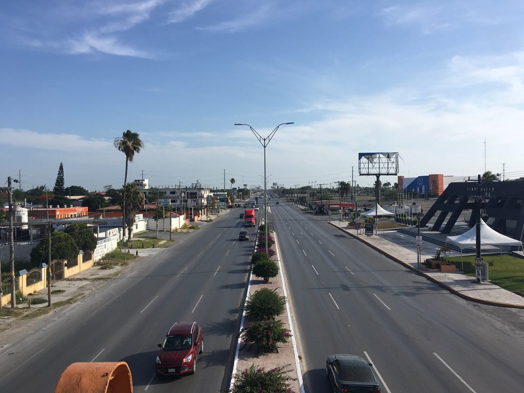 Vista aérea al sur de la ciudad actualmente en expansión. A lado derecho se aprecia el centro de convenciones Mundo Nuevo.